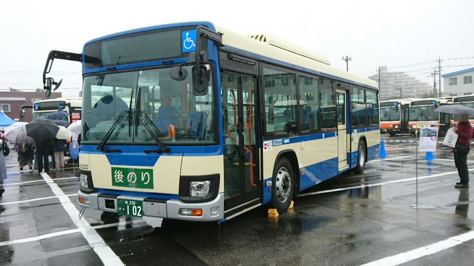 東武バス いすゞ・エルガ 2KG-LV290N2